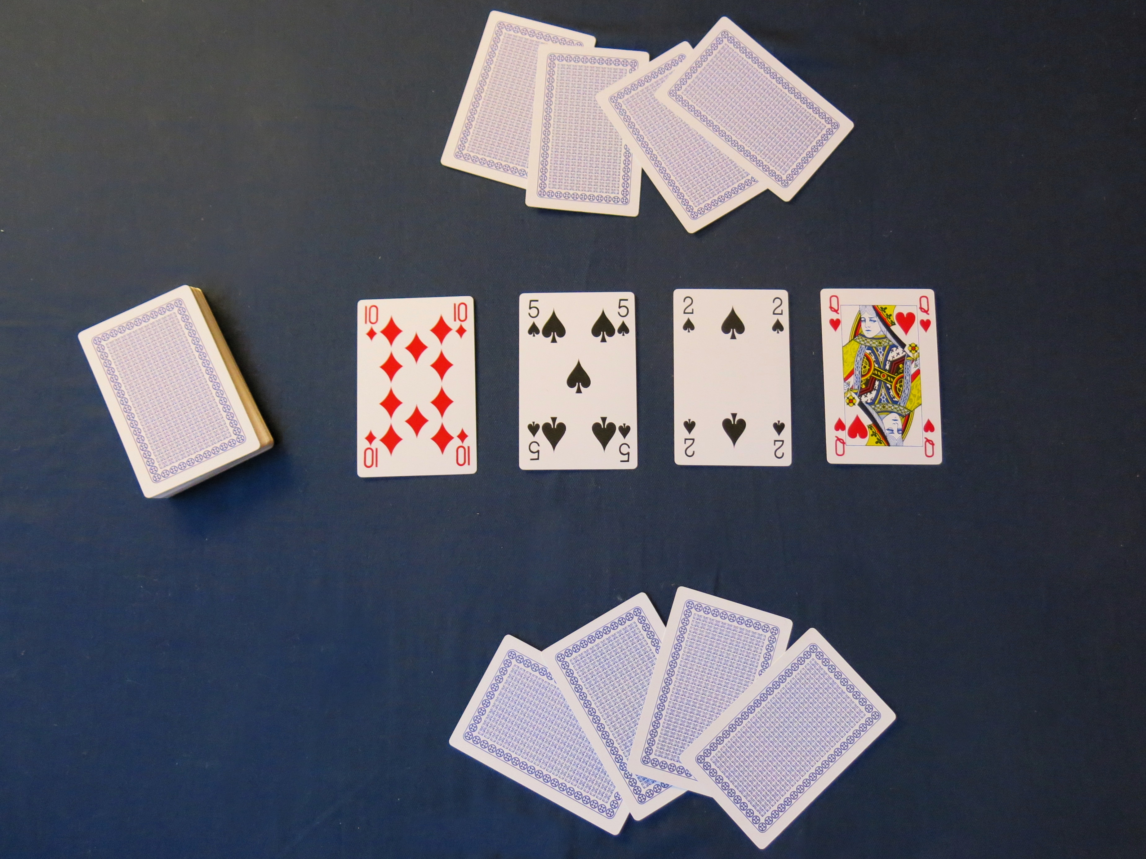 Kortgivning til kortspillet kasion